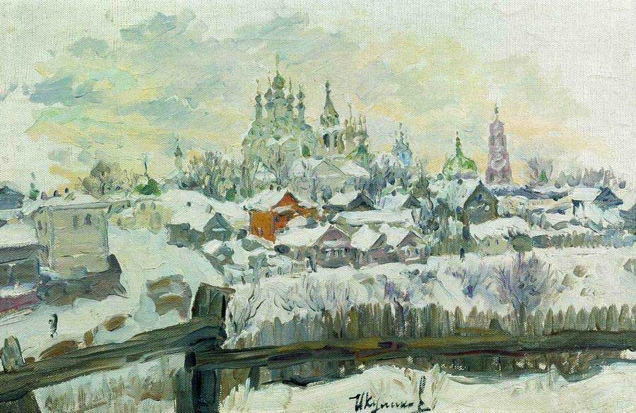 Куликов И.С. Муромские монастыри. 1914. Холст, масло. Дом-музей И.С.Куликова